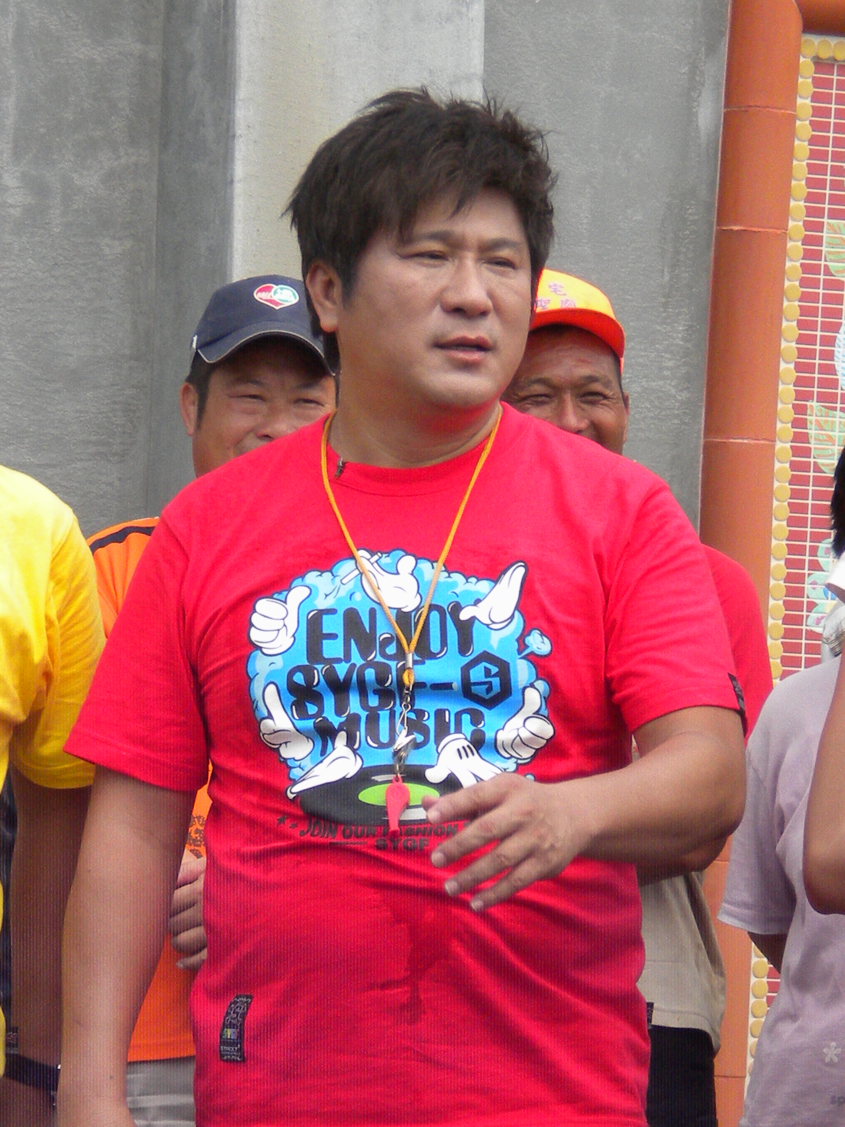 中文（台灣）: 台灣綜藝節目主持人胡瓜，本名胡自雄，人稱「瓜哥」。Bân-lâm-gú: Kua-ko(Ôo Tsū-hiông). 瓜哥（胡自雄）。